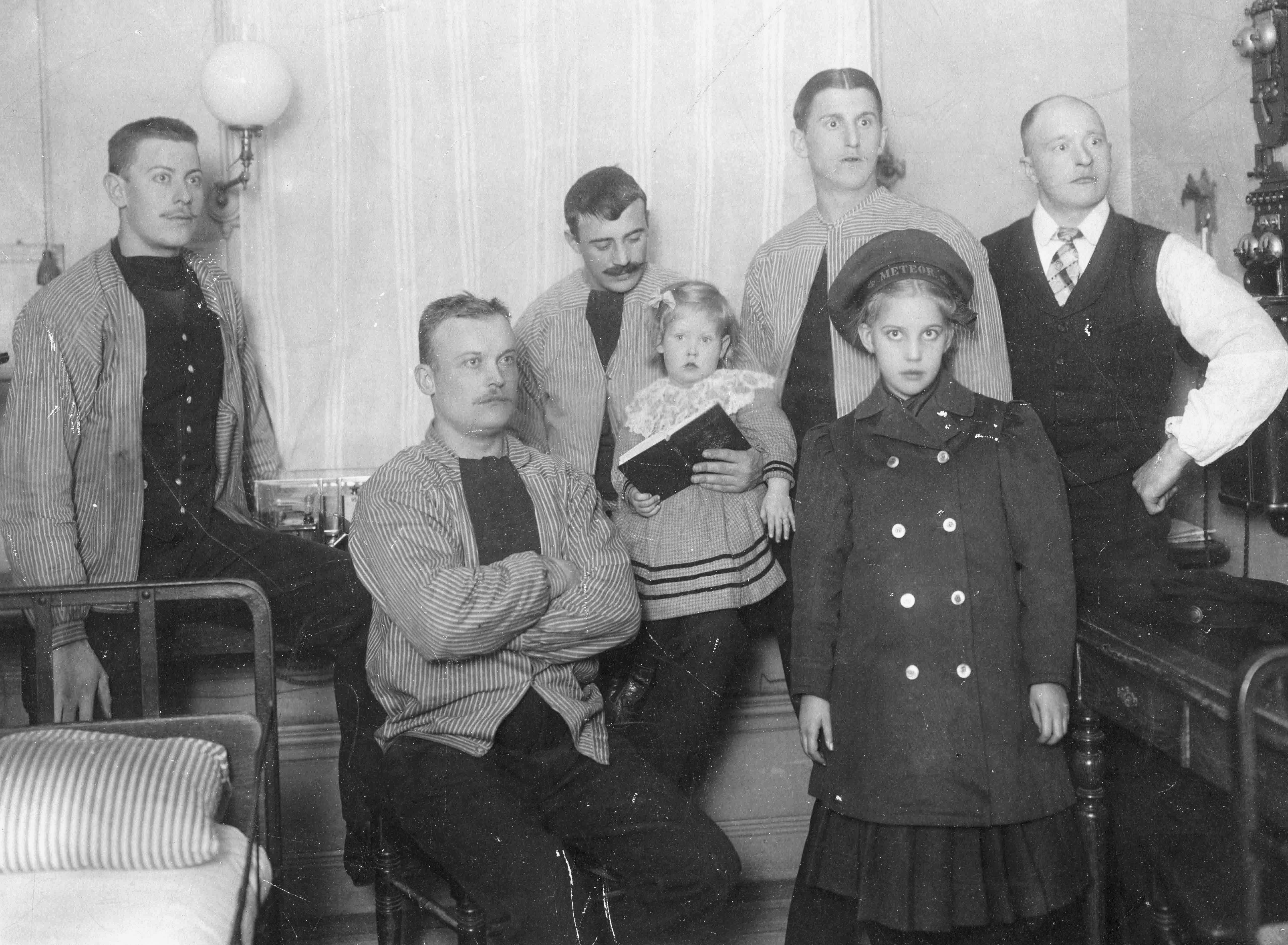 Djurgårdens brandstation, personal